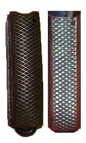 Comparacion de los dos tipos de Estuches del muelle real (MSH)